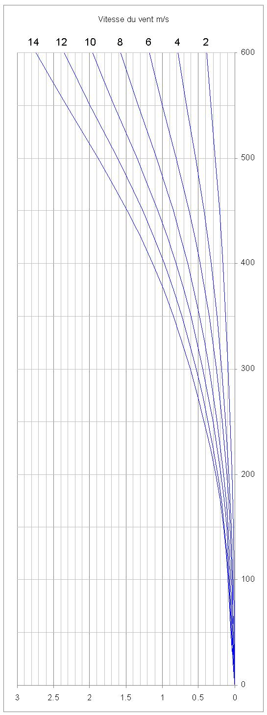 Fass57 influence du vent transversal